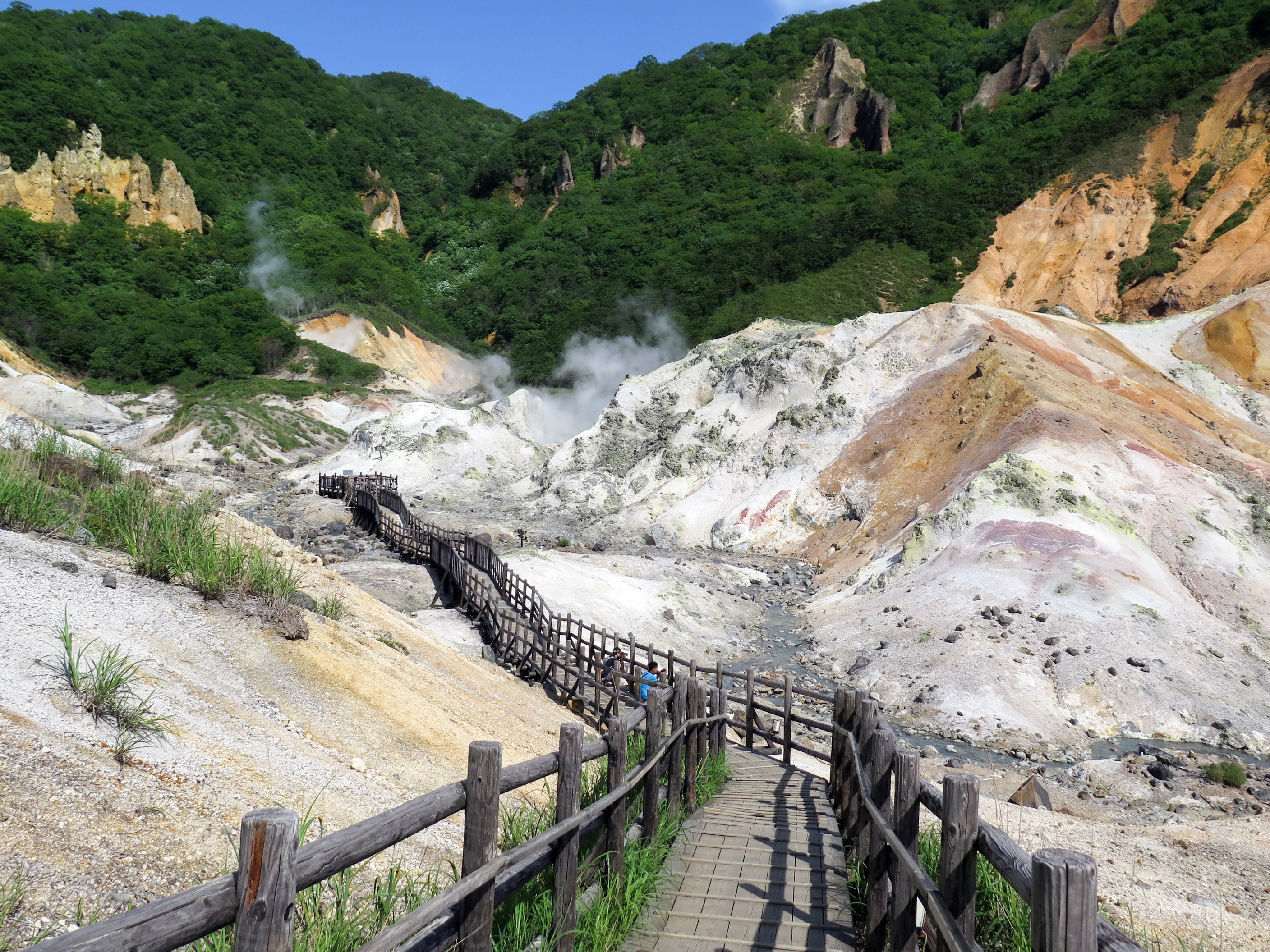 Noboribetsu Jigokudani (Hell valley) Tessen Pond